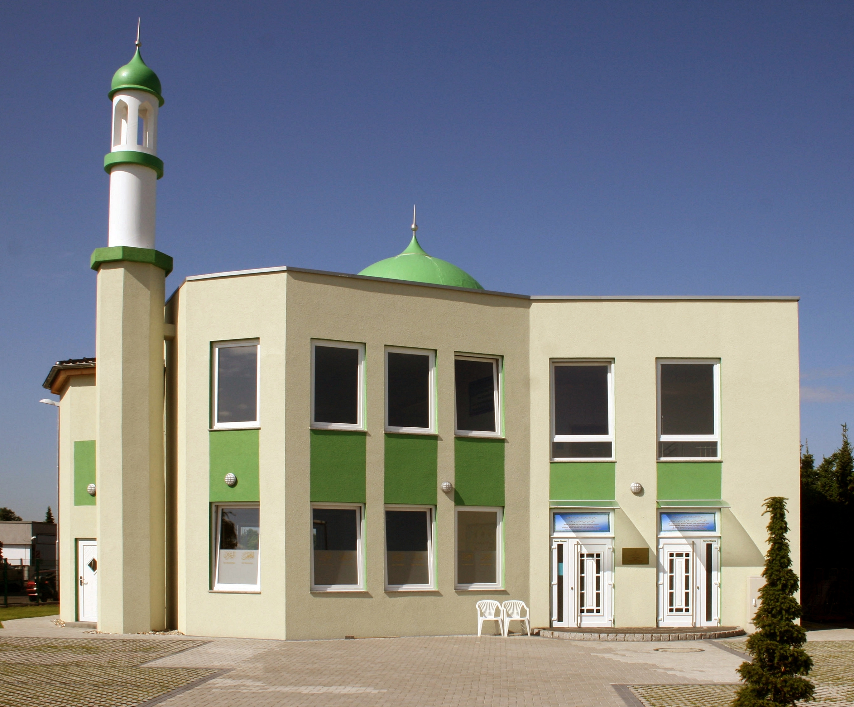 Anwaar-Moschee der Ahmadiyya Muslim Jamaat in Rodgau (Hessen), Stadtteil Jügesheim